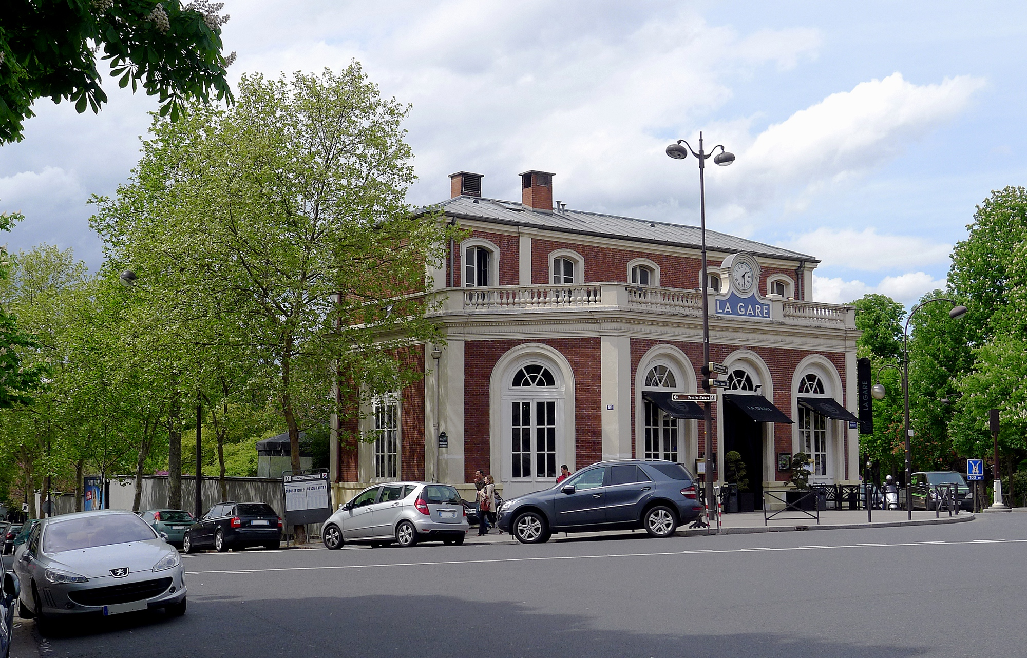 Boulevard de Beauséjour et chaussée de la Muette (ancienne gare de la Muette) - Paris XVI